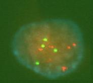 צילום פלורוסנטי של גרעין תא סרטני (מחולת סרטן השד). התא טופל בגלאי לצנטרומר של כרומוזום 17 (ירוק) ובגלאי לגן HER-2 (אדום). הבדיקה מראה כי התא מכיל את הגן HER-2 בשמונה עותקים במקום בשתי עותקים בתא נורמלי.